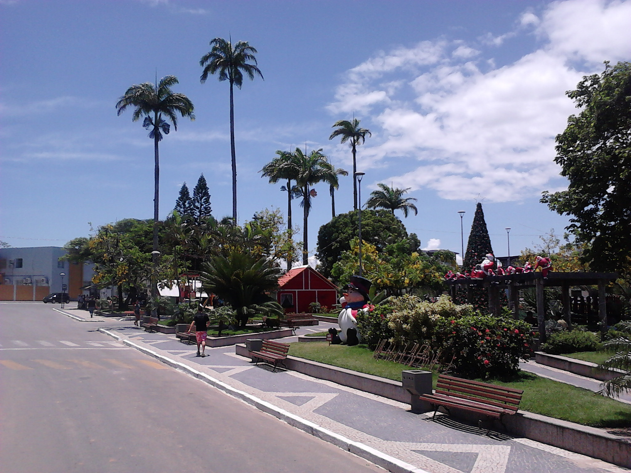 Praça na Vila de Itapemirim, na região de Marataízes.